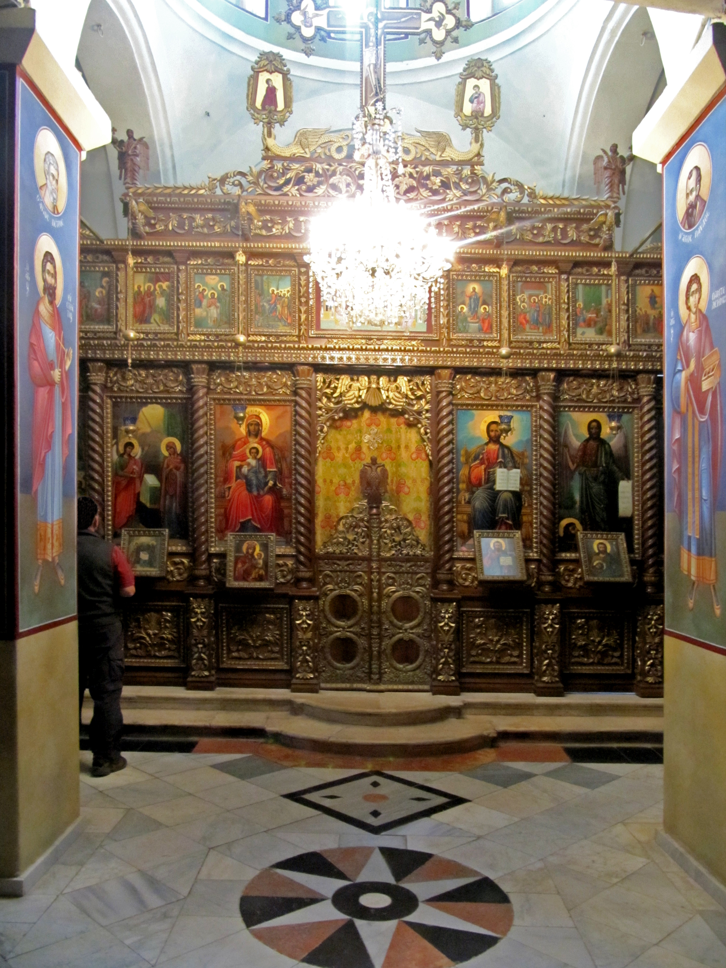 Jericho (more details in the photo's title) יריחו (מידע נוסף בשם הקובץ)